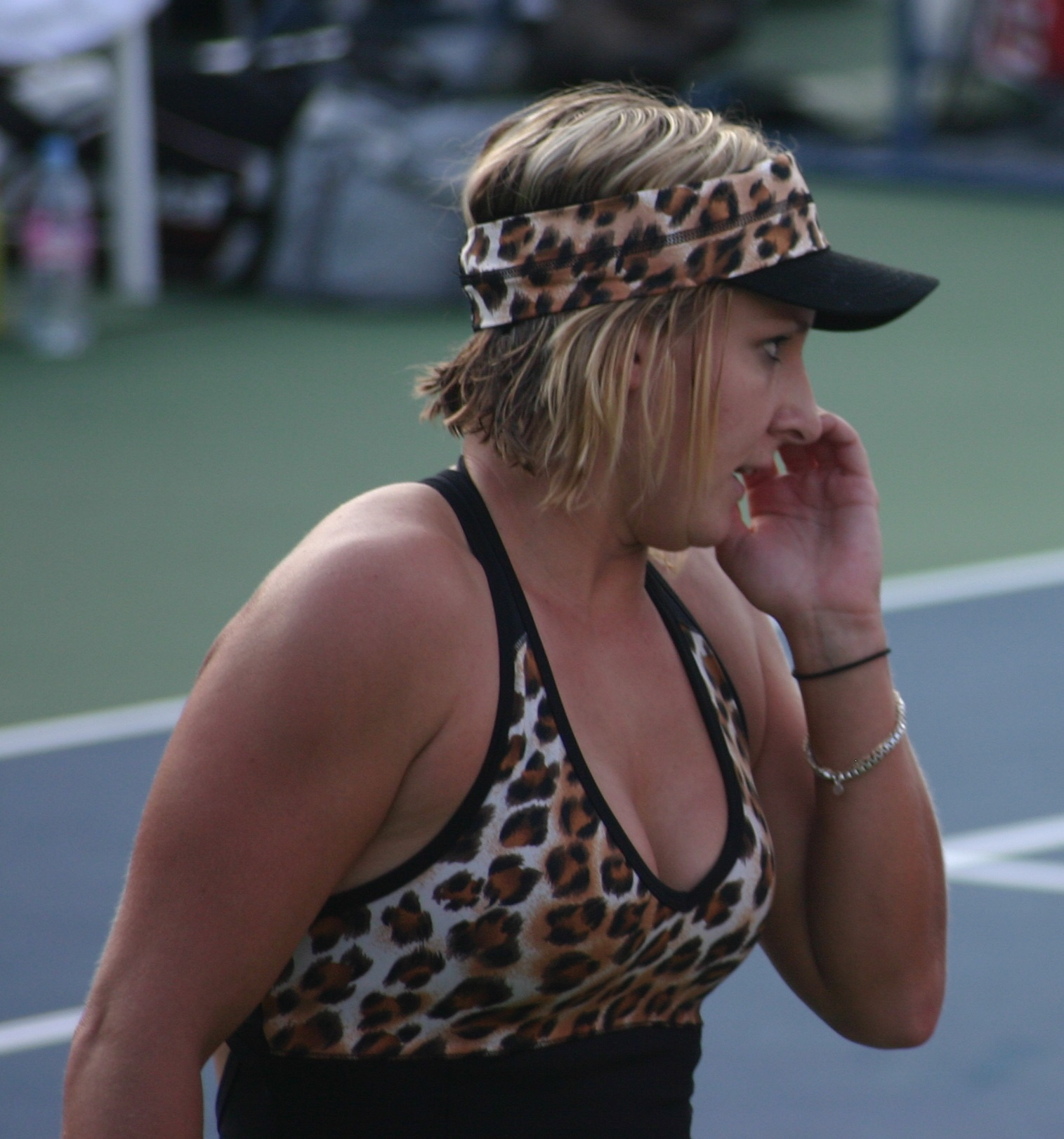 Emiliàn e rumagnòl: La Bethanie Mattek-Sand tòlta śò durànt gl'US Open dal 2007